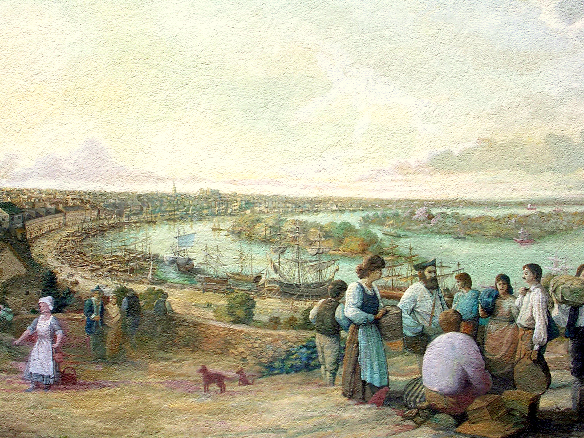 Détail de la fresque du Mémorial des Acadiens réalisée par Robert Dafford, rue des Acadiens à Nantes, figurant le séjour des Acadiens en déportation de 1775 à 1785 à Chantenay, aujourd'hui quartier de Nantes. On distingue en arrière-plan le port de Nantes et le quai de la Fosse en particulier tel qu'il se présentait au XVIIIe siècle.